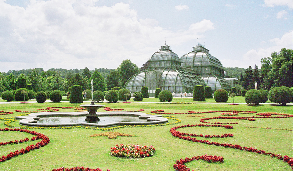 Palmenhaus in the park of Schloss Schönbrunn in Vienna